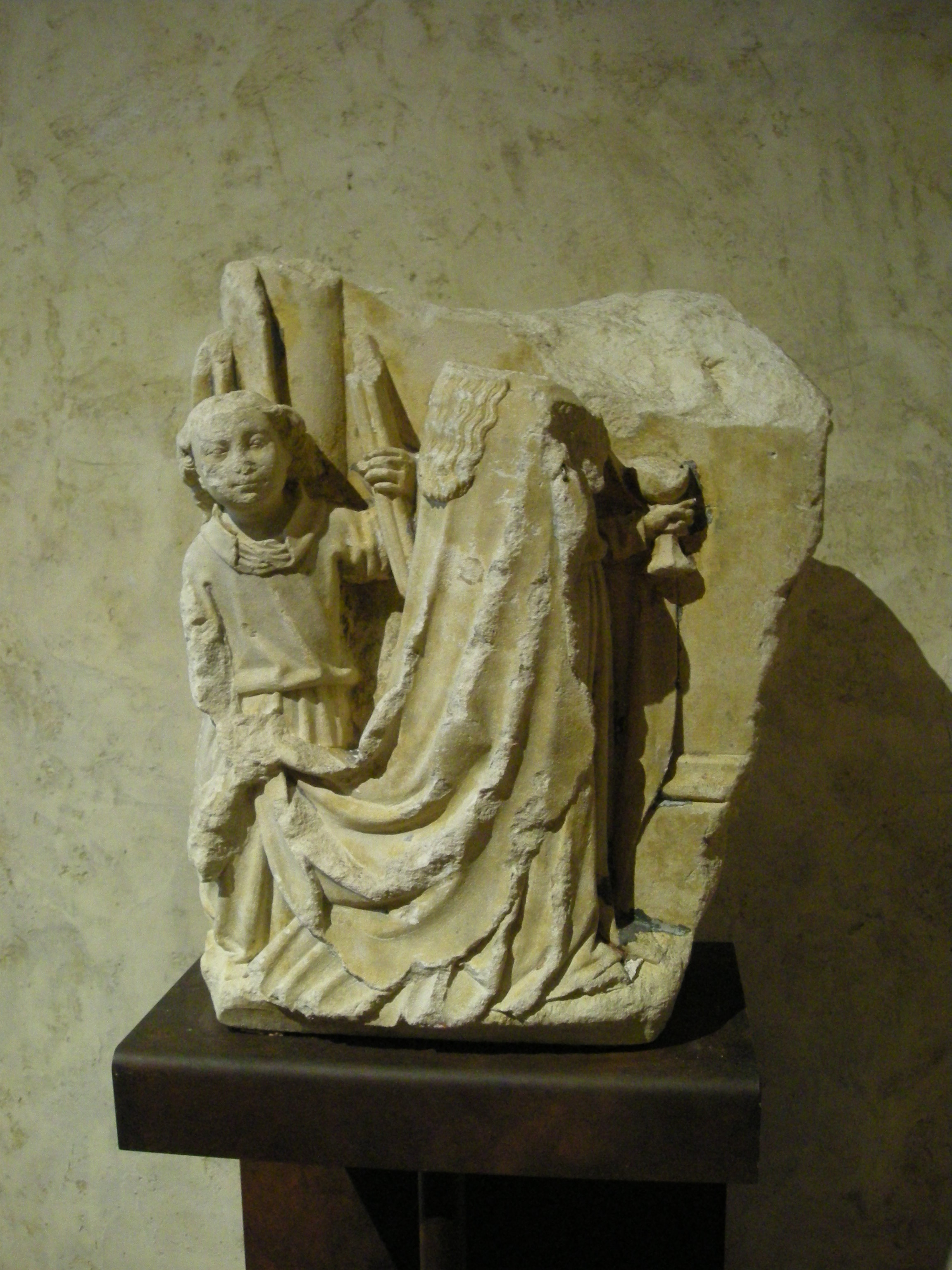 Communion de sainte Avoye, sculpture en calcaire en provenance de l'église d'Azeville, présentée dans le cadre de l'exposition "Fragments d'Histoire" à l'abbaye de Hambye (Normandie)